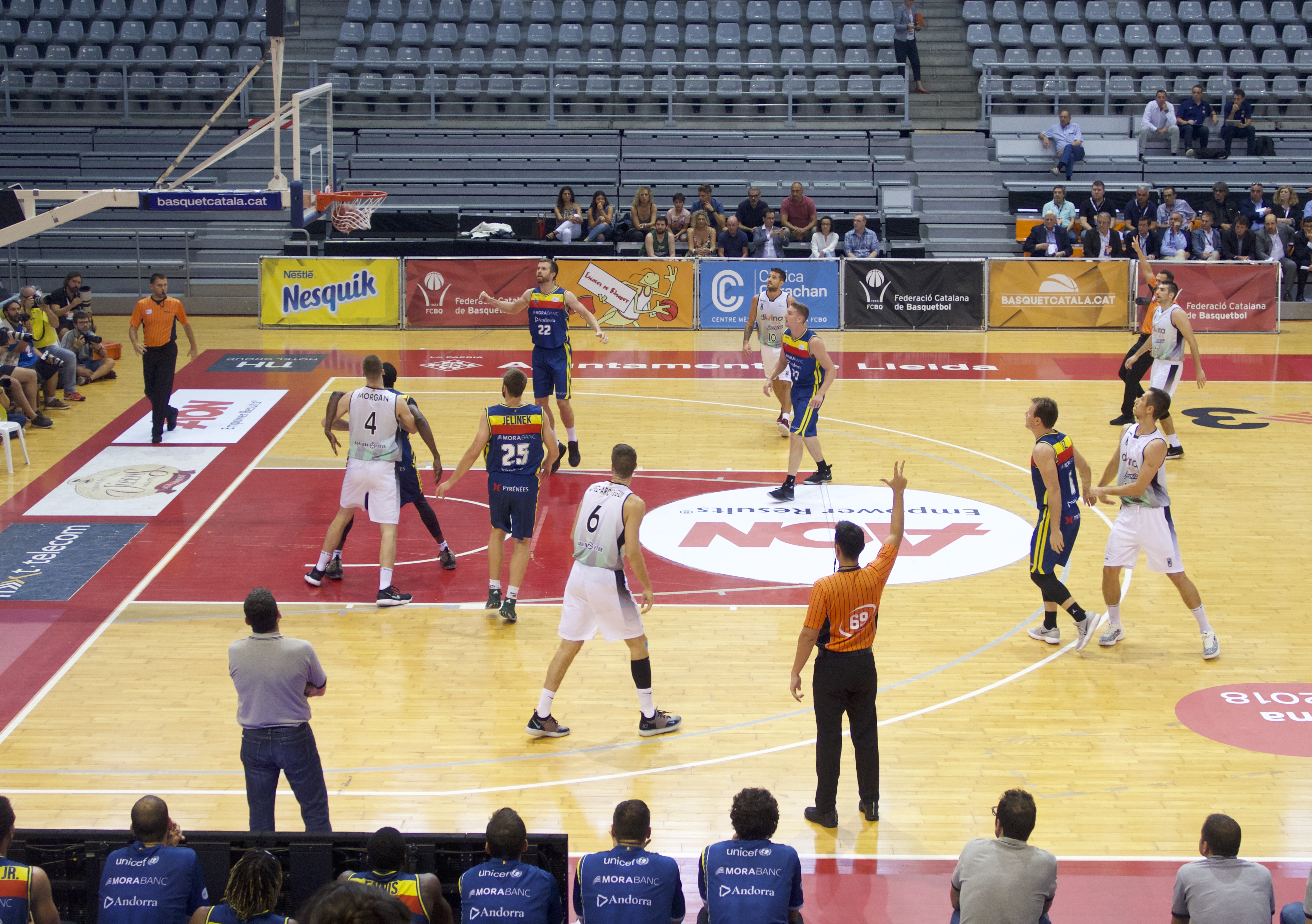 Triple de Josep Ignasi Nogués en el primer partit de semifinals de la Lliga catalana 2018-19 entre el Morabanc Andorra i el Divina Seguros Joventut.